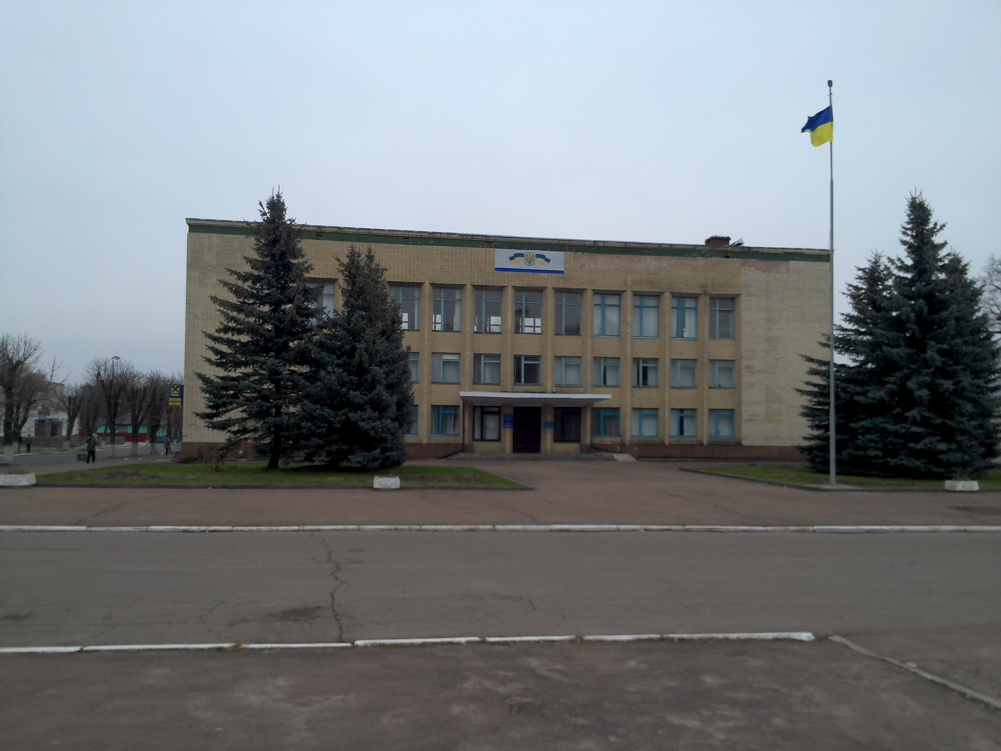 смт Народич